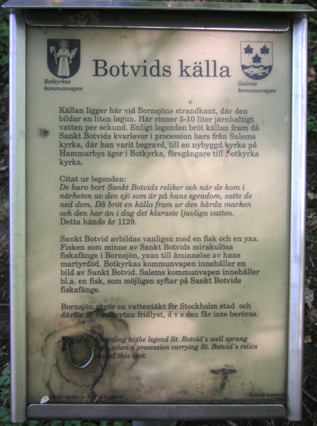 Botvids källa vid Bornsjön i Salem/Botkyrka, Sverige